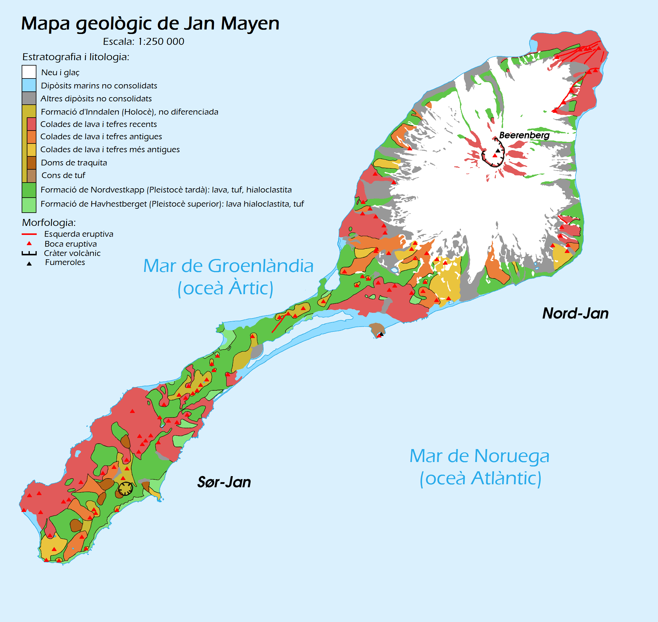 Mapa geològic de l'illa de Jan Mayen, Noruega